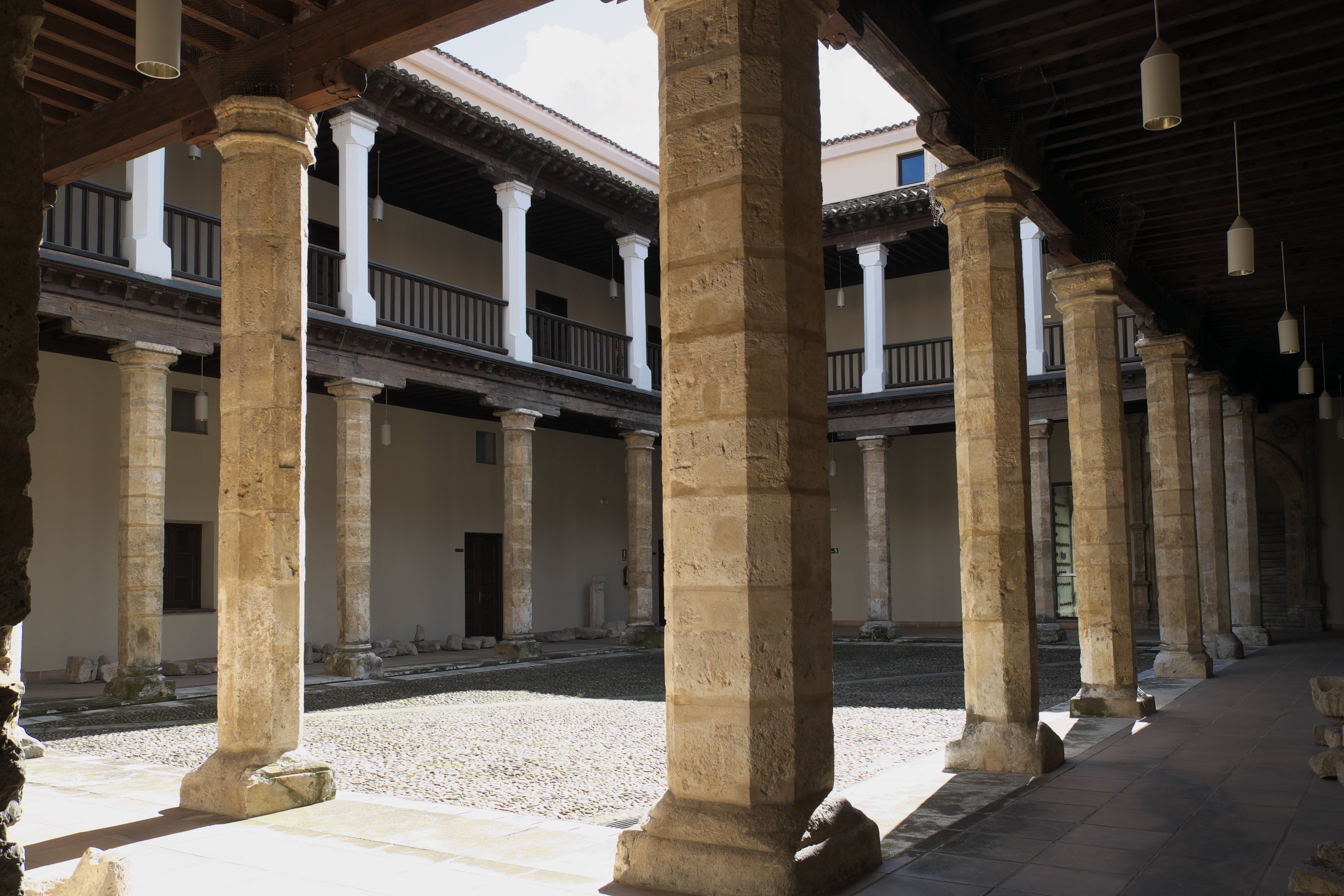 Palacio de los Vivero in Valladolid (Kastilien und León/Spanien), Innenhof